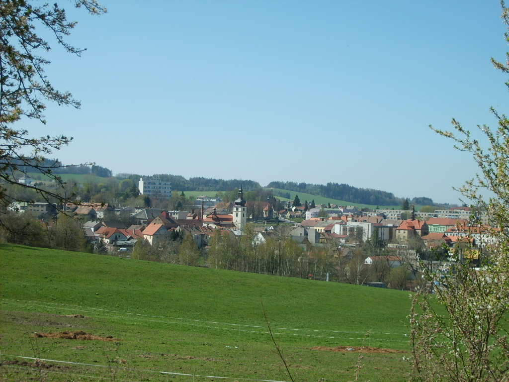 Pohled na město Votice (BN) z Čeřenské hory